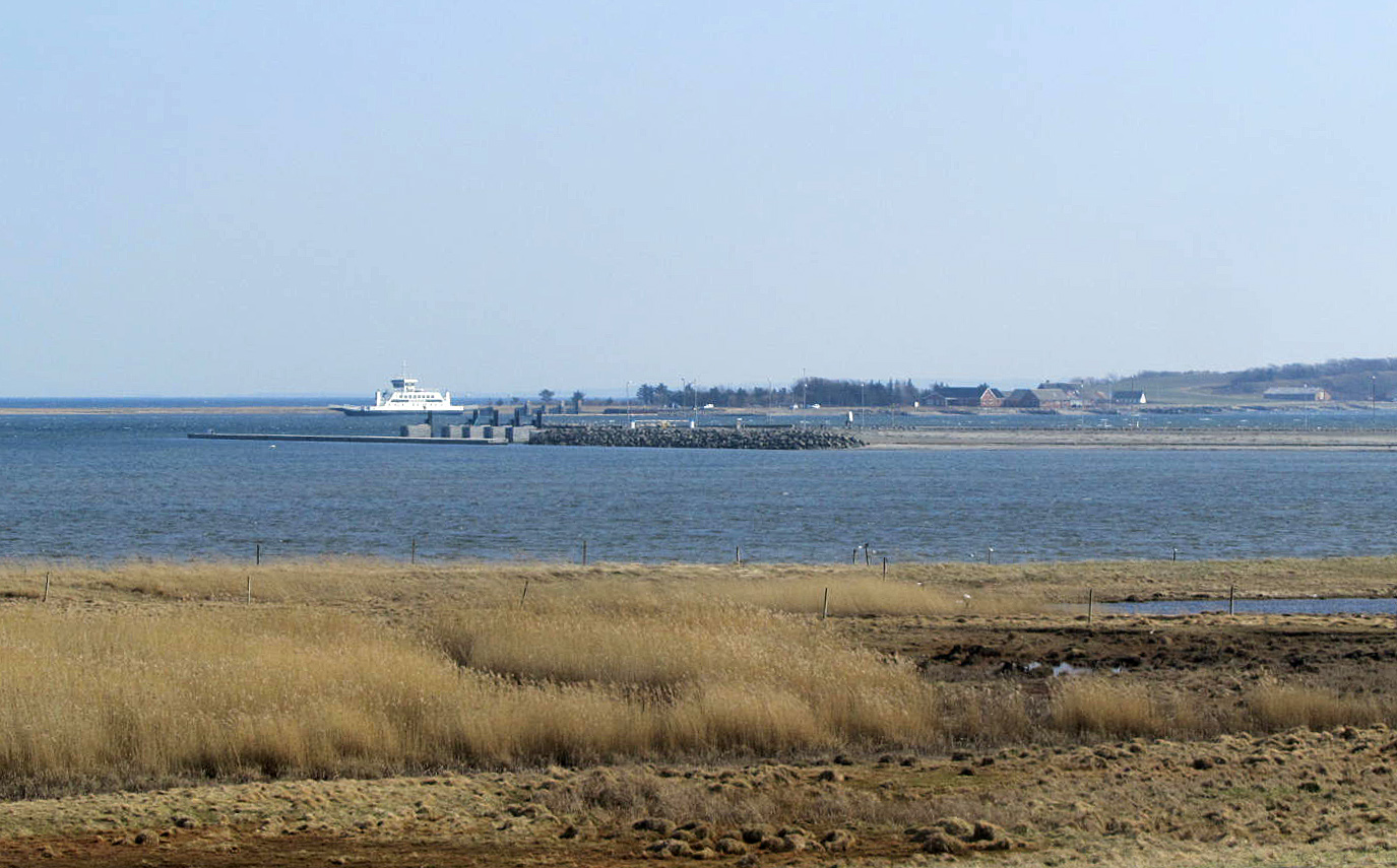 Feggesund set fra nord